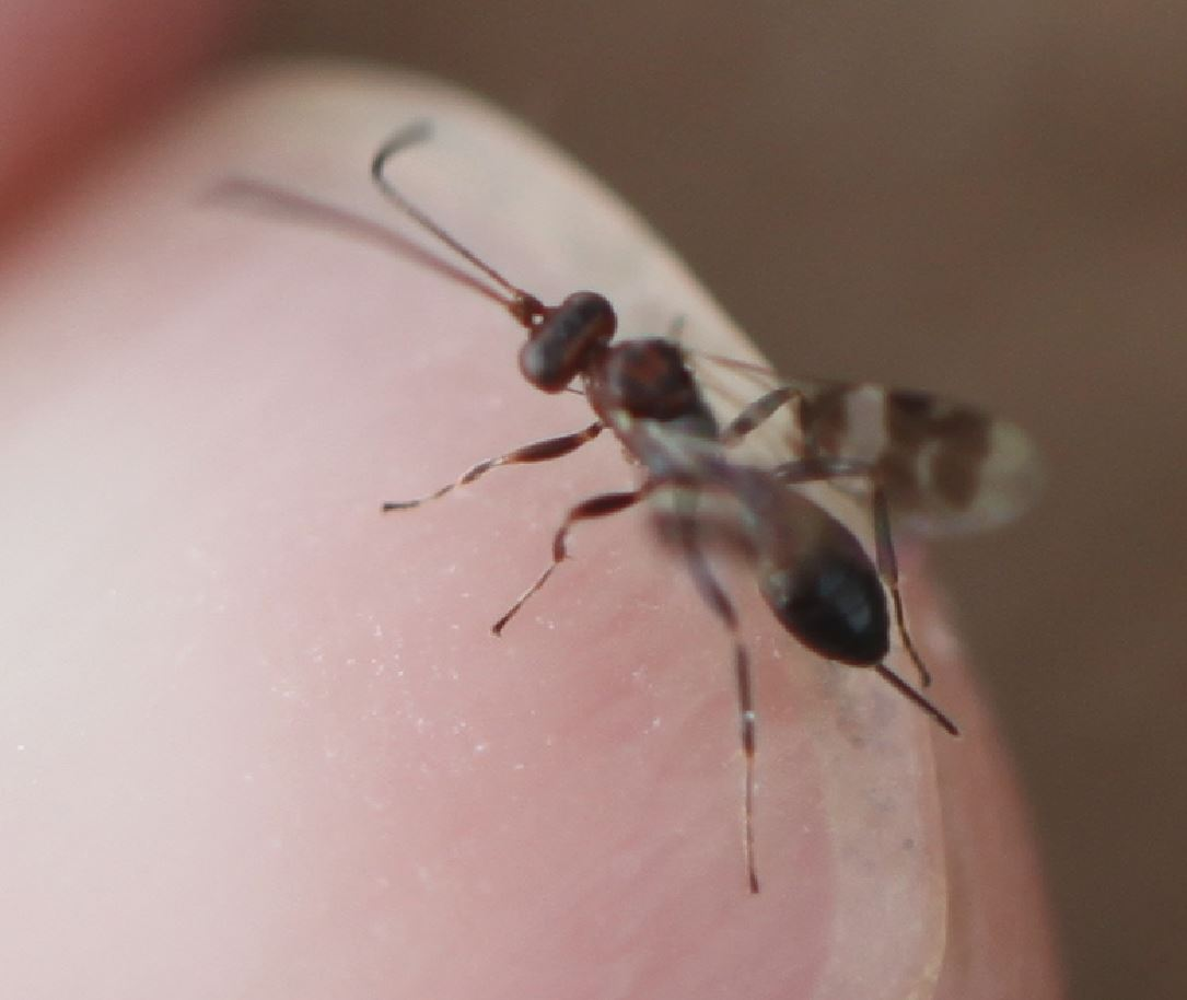 Schlupfwespe Gelis areator am 17. Oktober 2019 am Stamm einer Platane südlich von Heidelberg